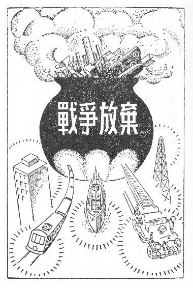 太平洋戦争終結後に短期間使用された中学校1年生用社会科の教科書『あたらしい憲法のはなし』での戦争放棄の原則を表した挿し絵。